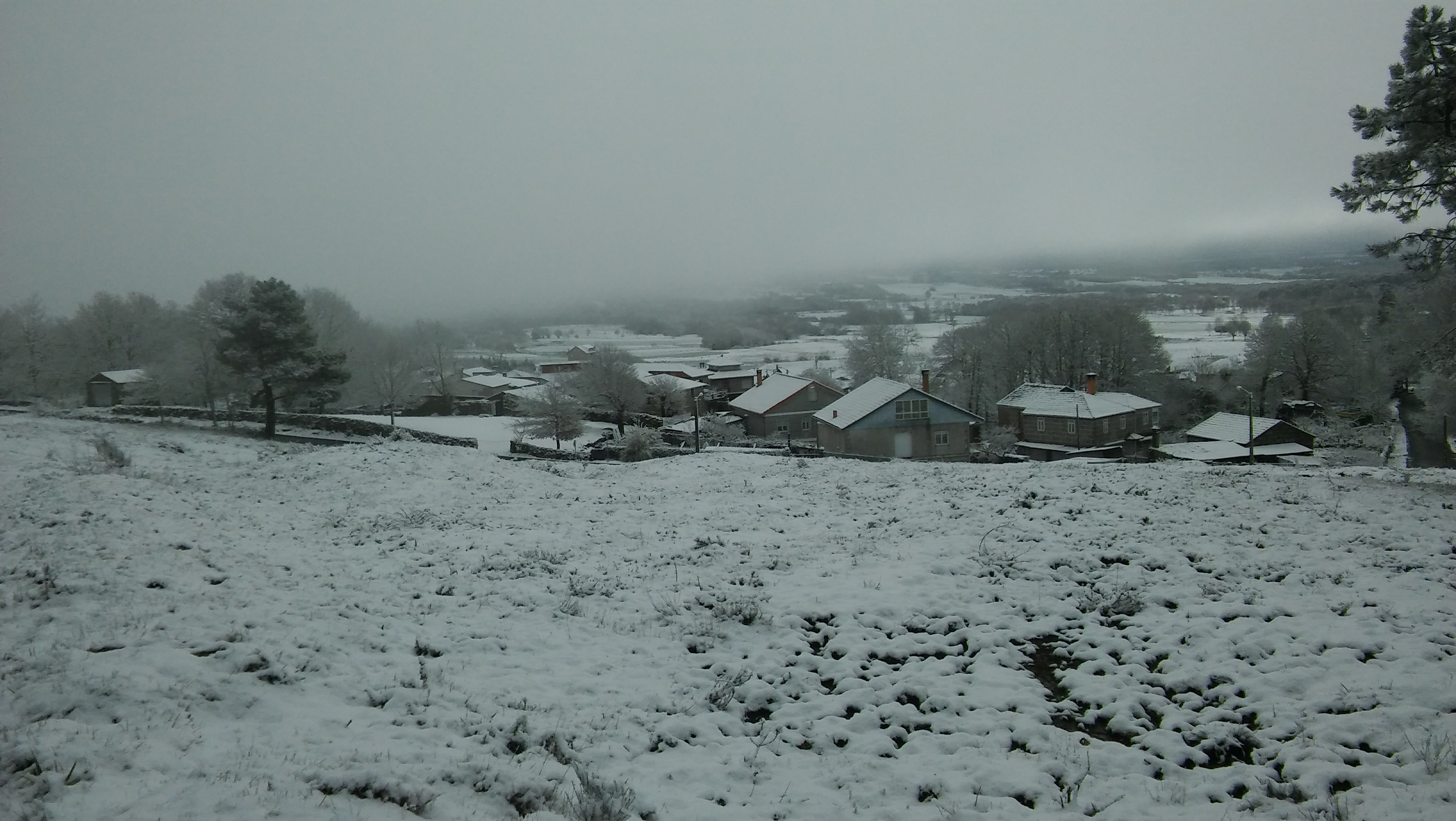 Vista de Cerdeira nevada